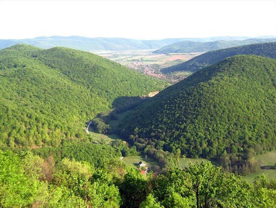 Szögliget latkepe a Szadvarrol.